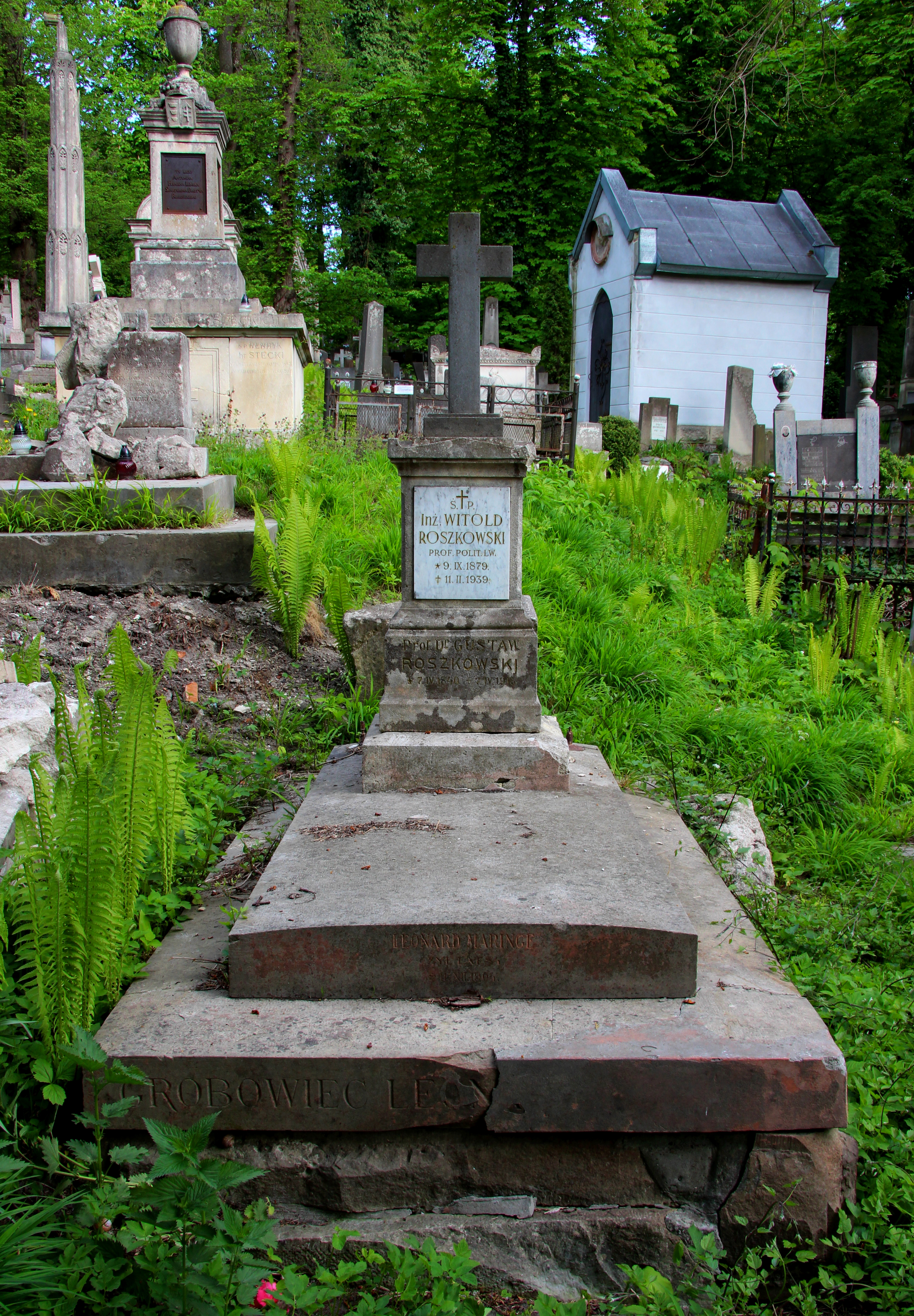 Grobowiec Leonarda Maringe (zm. 1904) oraz Gustawa i Witolda Roszkowskich; pole nr 5